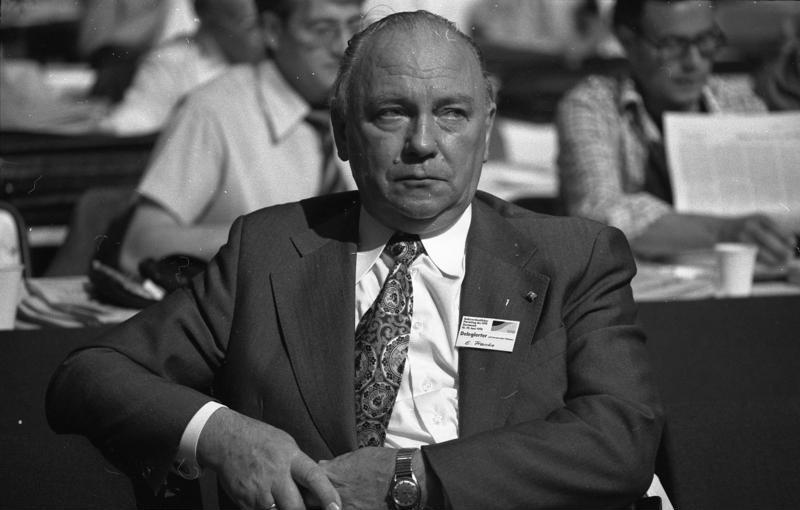 Außerordentlicher Parteitag der SPD in der Westfalenhalle Dortmund, 18.-19.6.1976